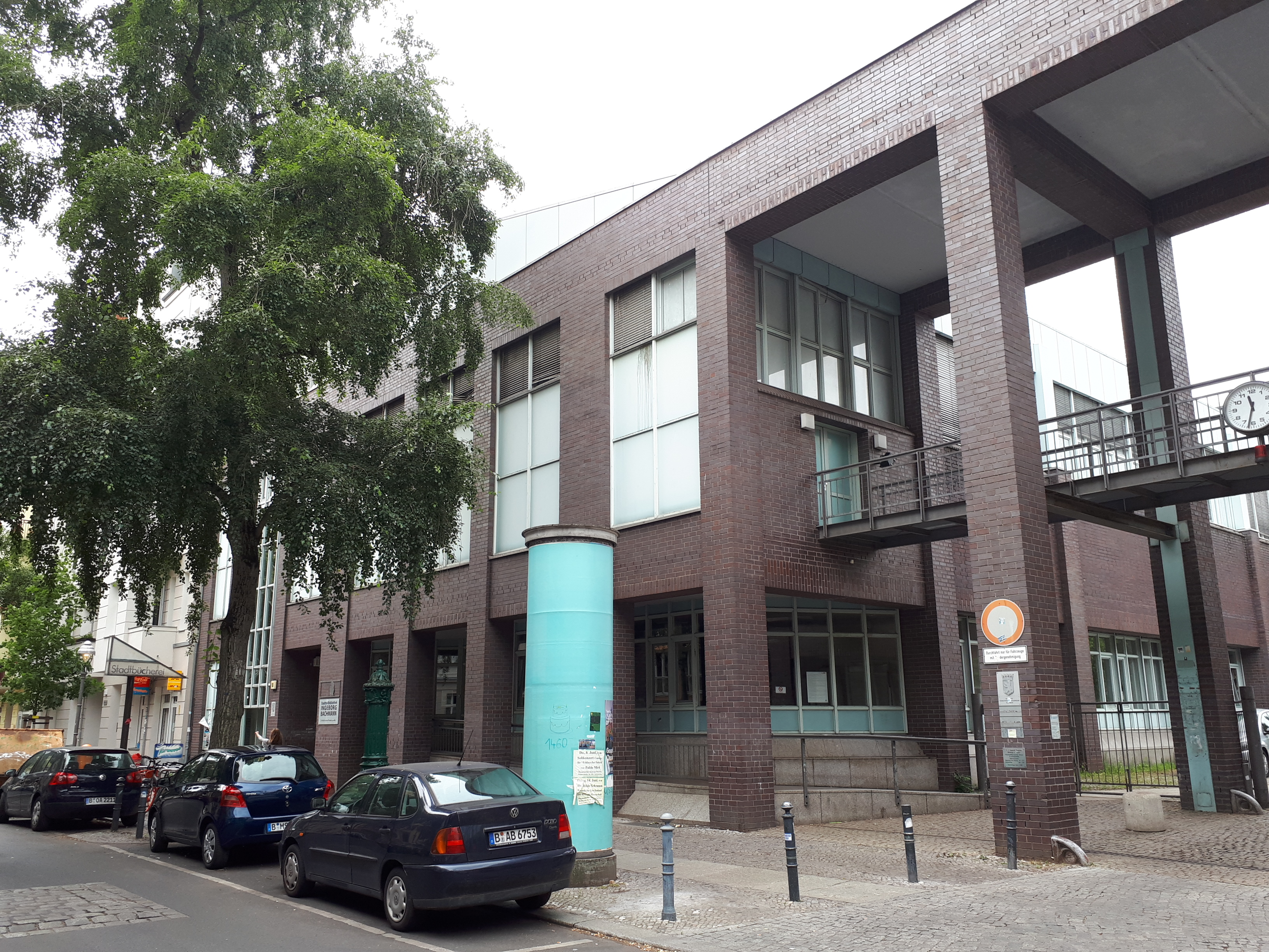 Charlottenburg Nehringstraße Ingeborg-Bachmann-Bibliothek